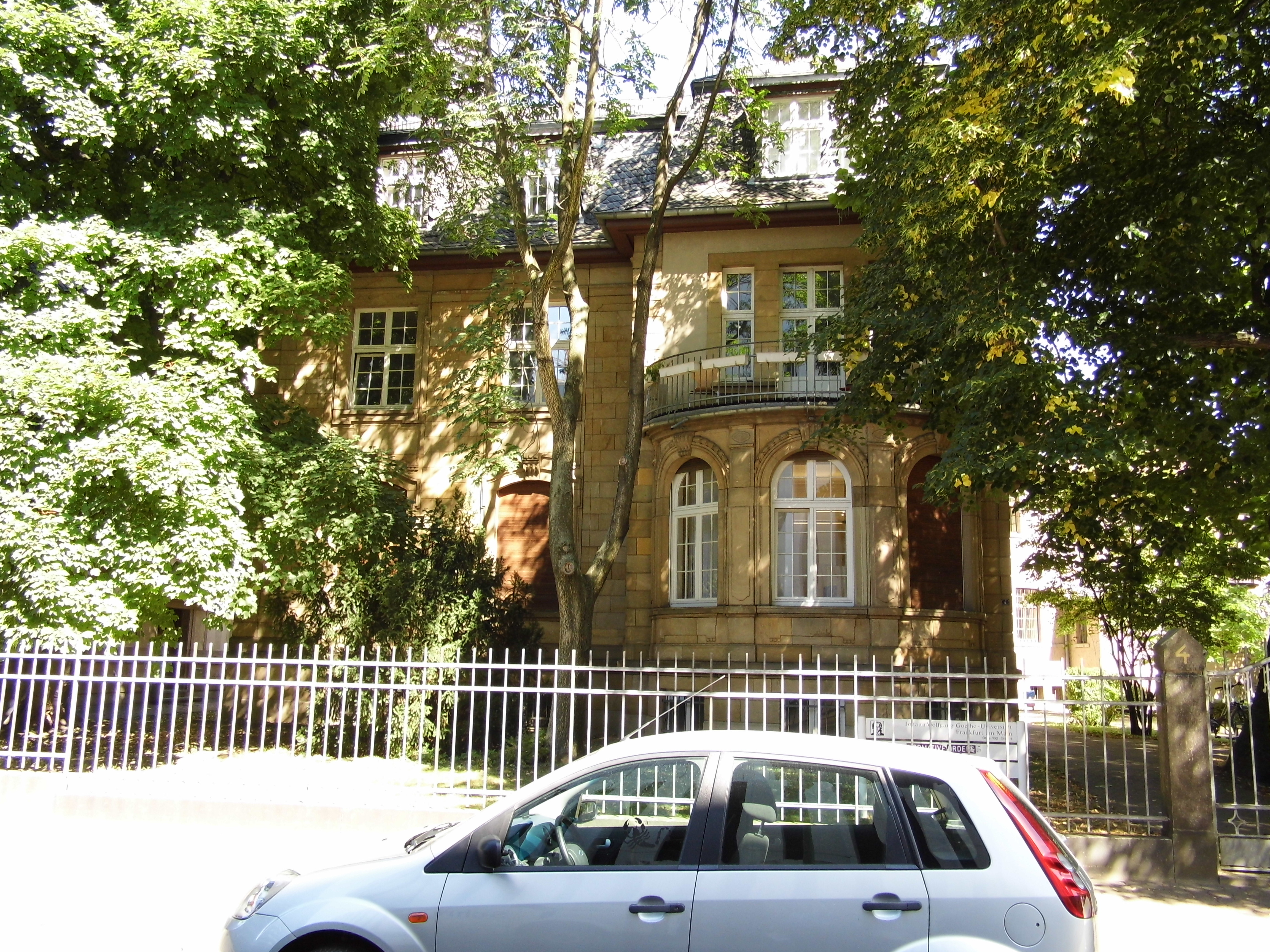 Frankfurt, Georg-Voigt-Straße 4. Neoklassizistische Villa mit Sandsteinquaderfassade und aufwendigem Schmuck im Fensterbereich, erbaut 1910. Straßennamenspatron Dr. Georg Voigt (1866–1927), Frankfurter Oberbürgermeister von 1912 bis 1924. Die Villa gehört zu einem kleinen Ensemble freistehender Gebäude, die die Hochschule früher für die Unterbringung von Instituten genutzt hat, so z.B. Institute for Law and Finance (ILF). Neuer Eigentümer und Nutzung ab 2016 Tibethaus Deutschland e.V. - Deutsche Buddhistische Union